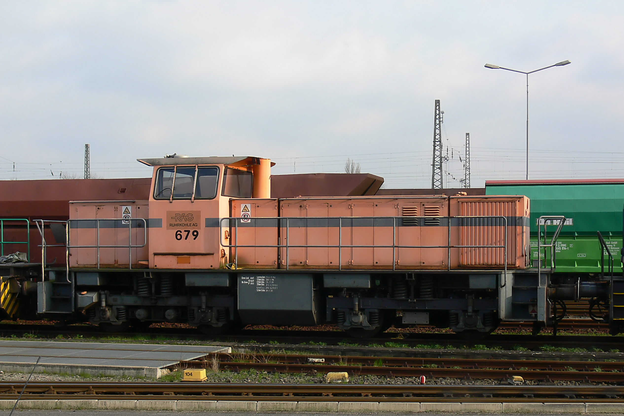 MAK G 1204 BB als 679 der RAG Bahn und Häfen in Moers Vossloh-Gelände